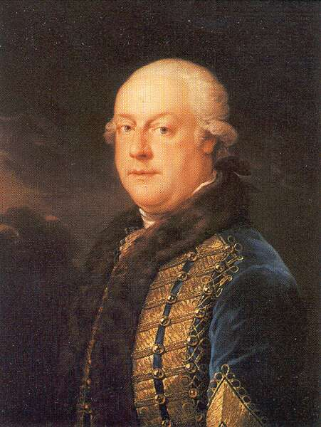 Esterházy Ferenc portréja 1770 körül